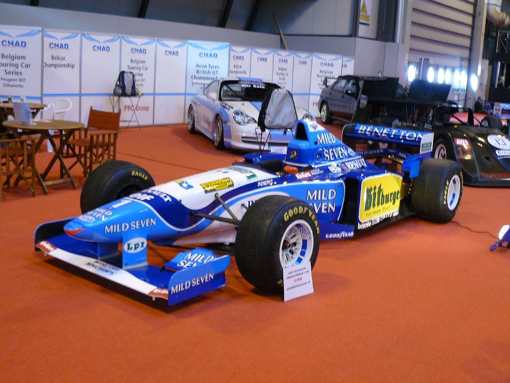 Benetton F1 ex-Schumacher